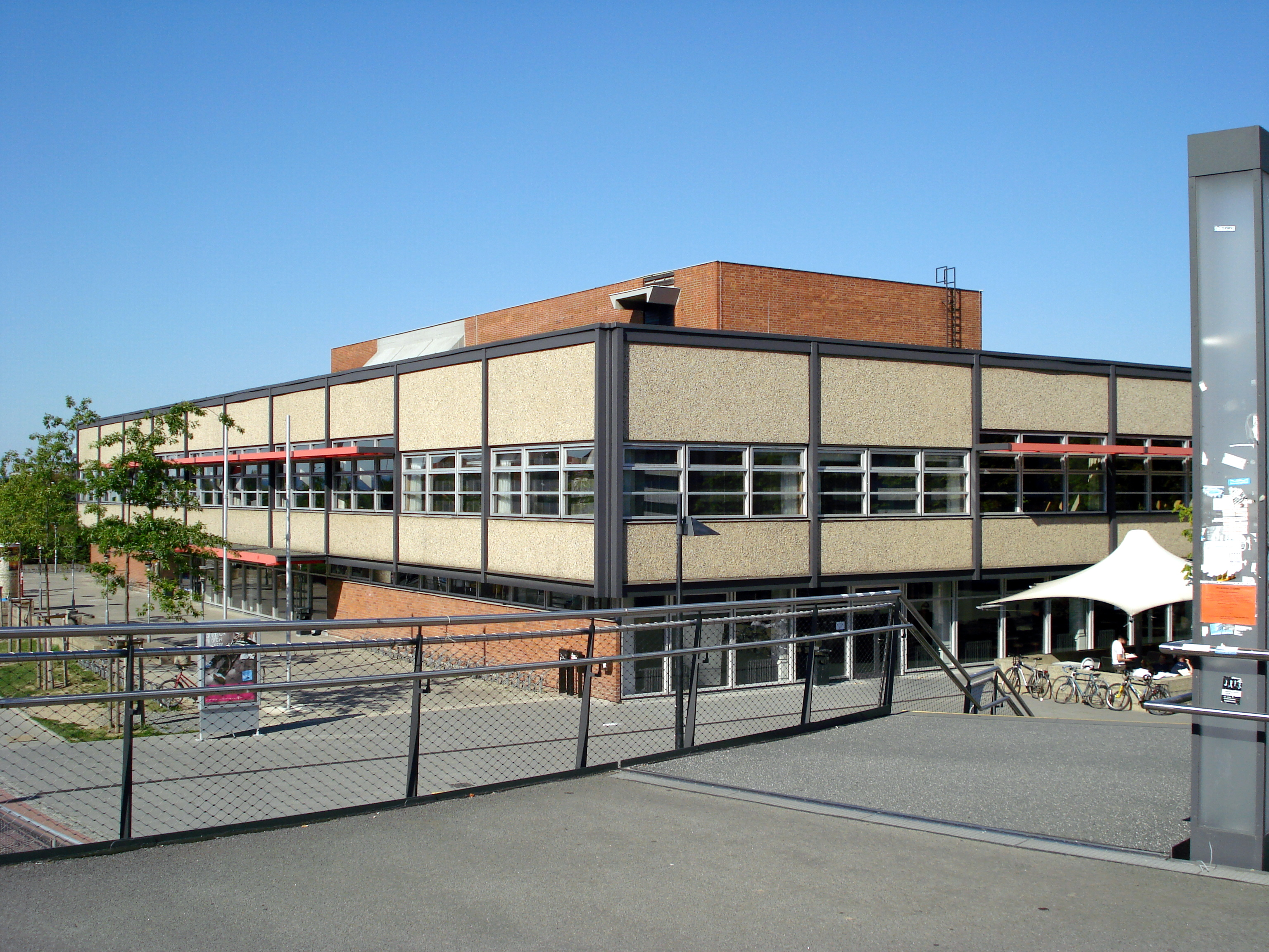 Neue Mensa Bergstraße der TU Dresden (Blick von der Fußgängerbrücke über die Bergstraße)